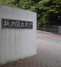 横浜国立大学（2007年6月1日撮影） Category:大学の画像